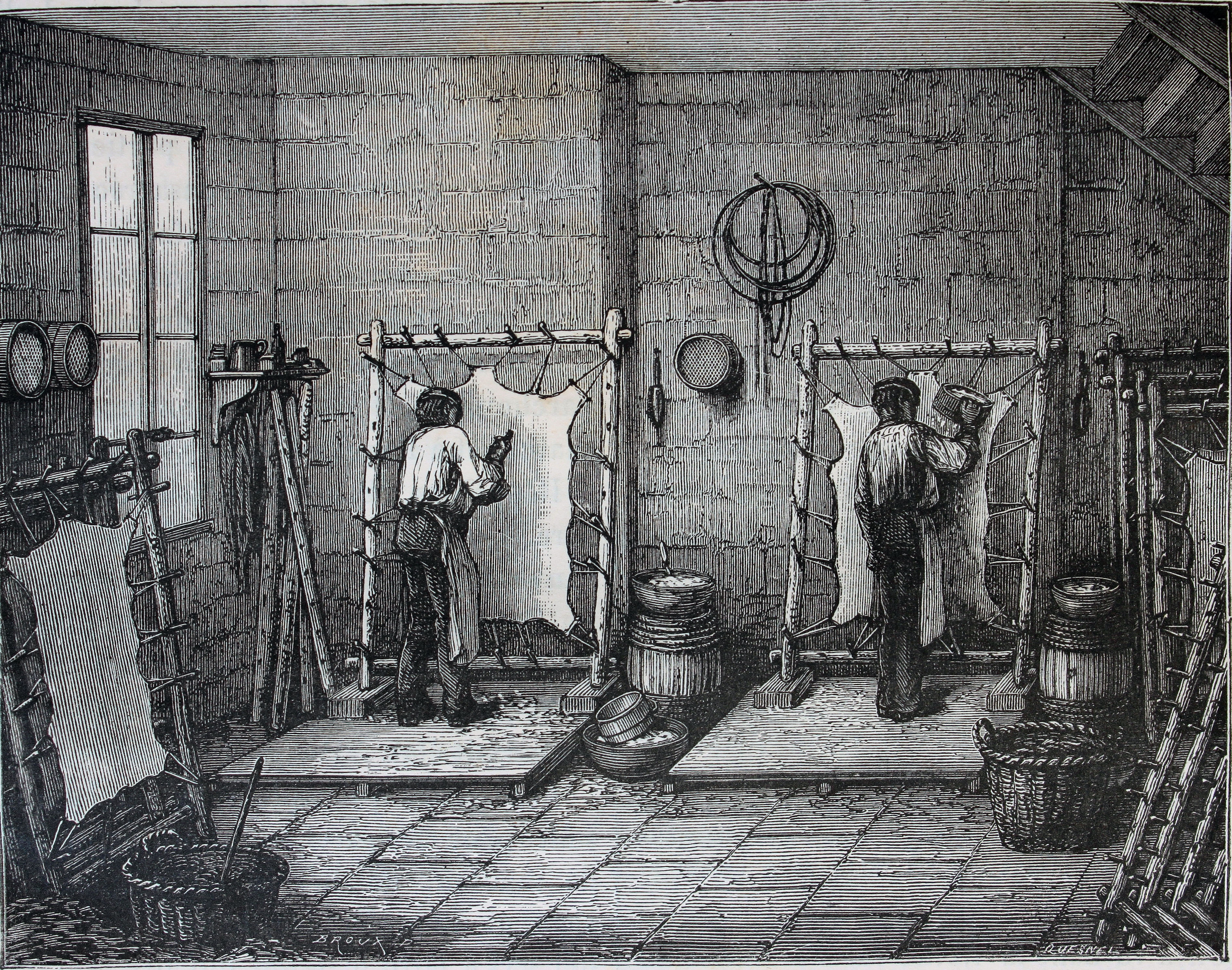 Ilustraciones de la obra : Les merveilles de l'industrie ou, Description des principales industries modernes / par Louis Figuier. - Paris : Furne, Jouvet, [1873-1877]. - Tome II